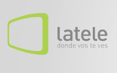 Logo del canal paraguayo LaTele